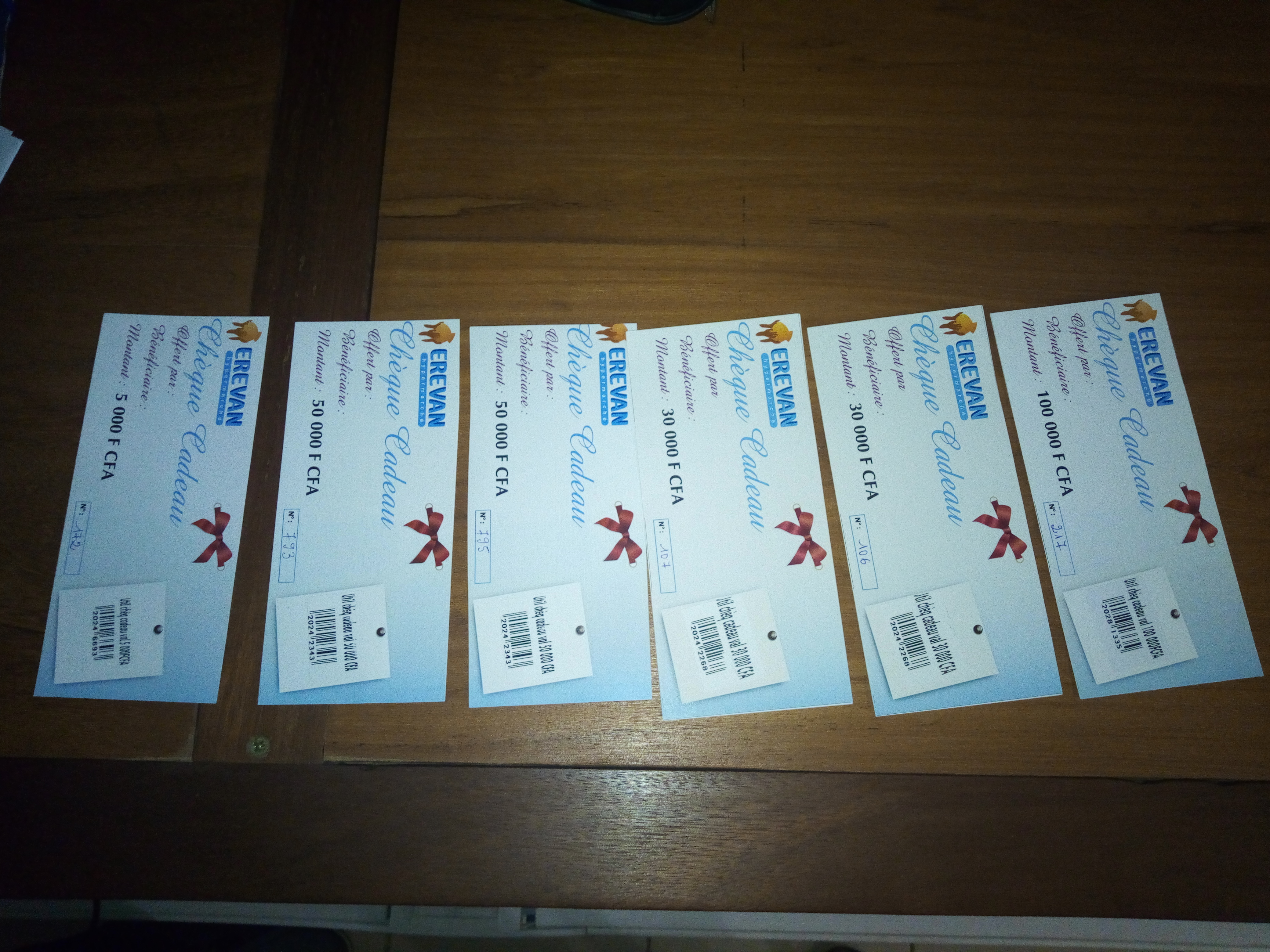 WLE 2019 Benin Felicitation ceremony in Abomey-Calavi